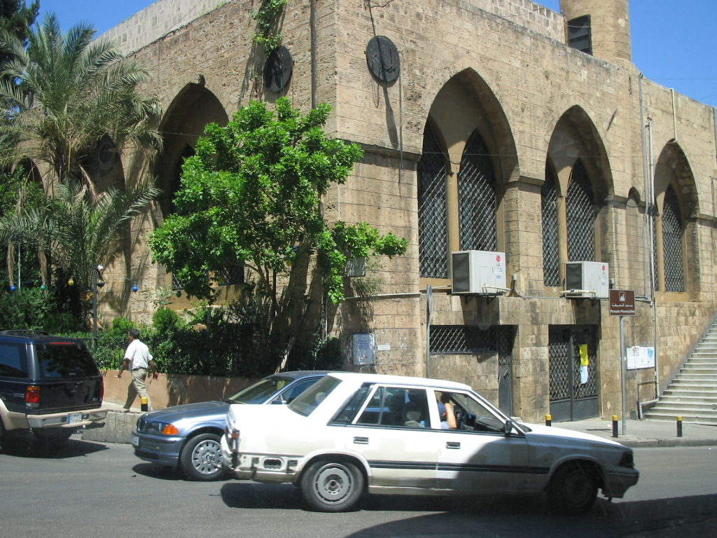 Mseitbe Mosque